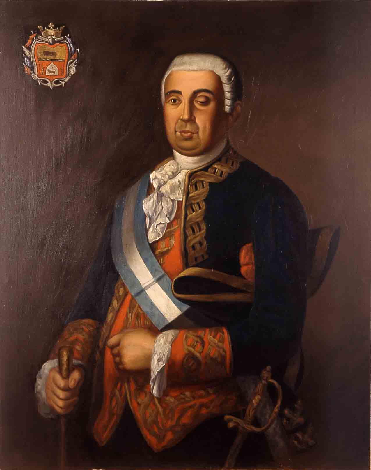 Retrato del marino y aristócrata español Francisco de Borja y Poyo (1733-1808), que fue capitan General de la Real Armada Española y II marqués de Camachos (en el reino de las Dos Sicilias).